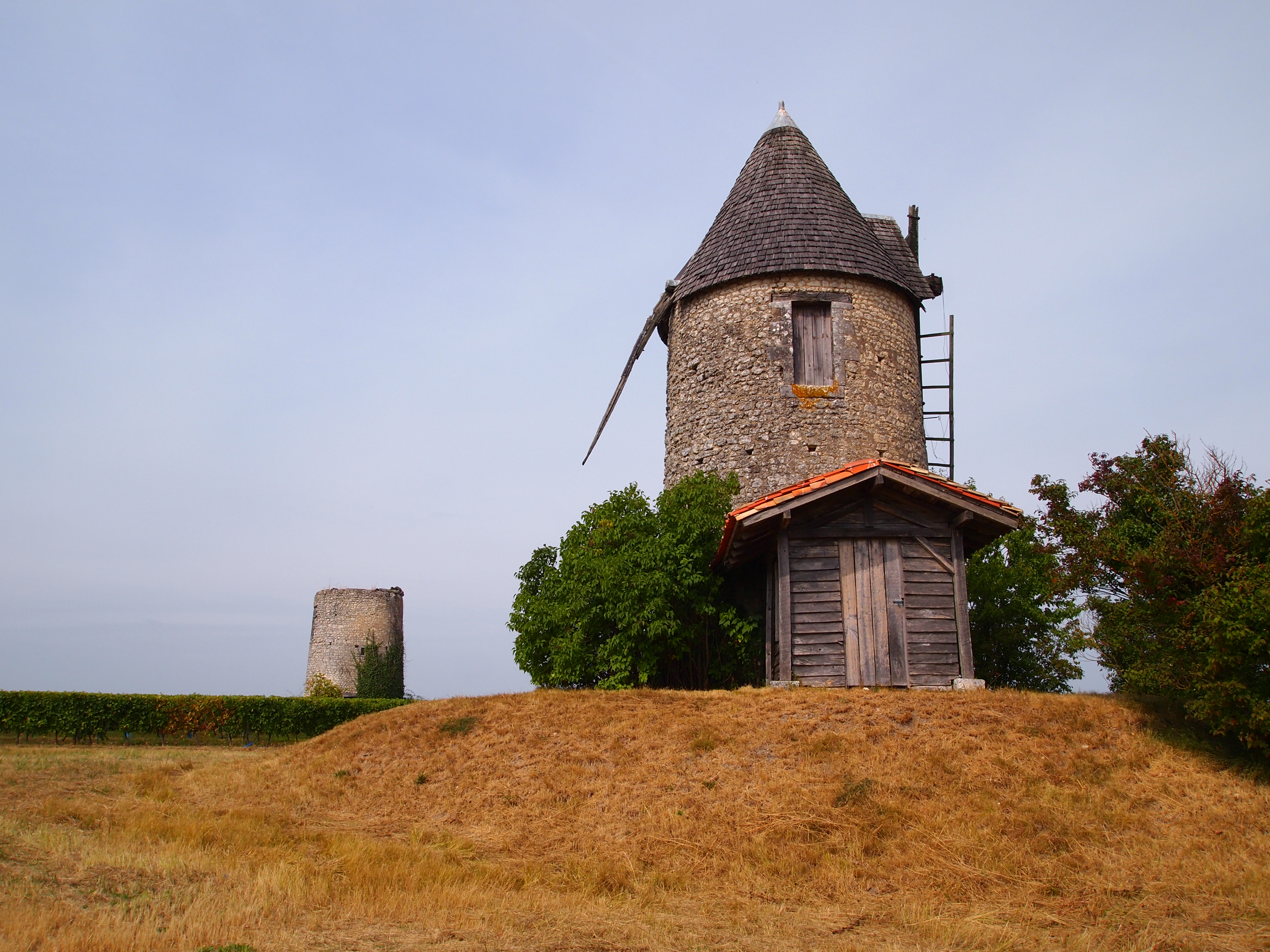 Moulin à vent de la Paille, à Bessac en Charente (inscrit, 2002)